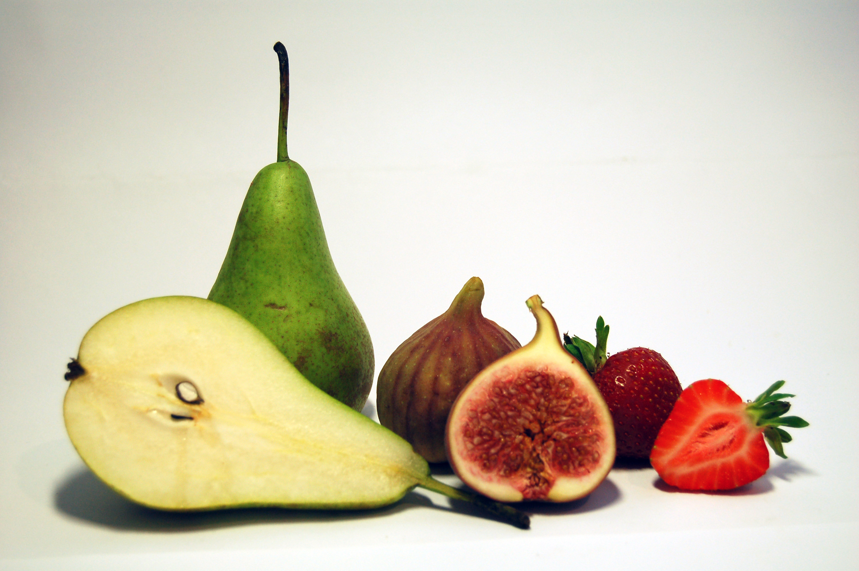 Pseudocarps